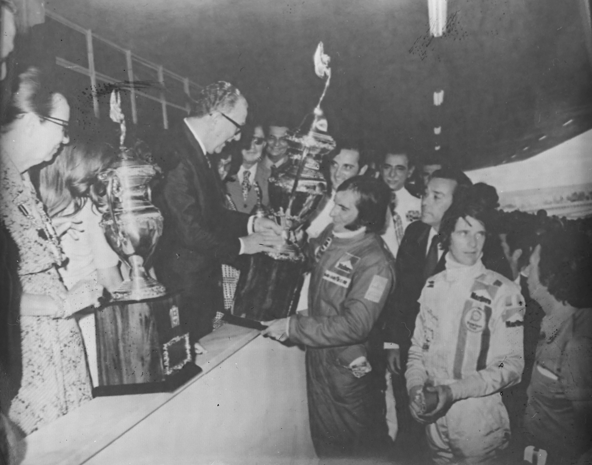 Imagem do Fundo Agência Nacional, do Arquivo Nacional